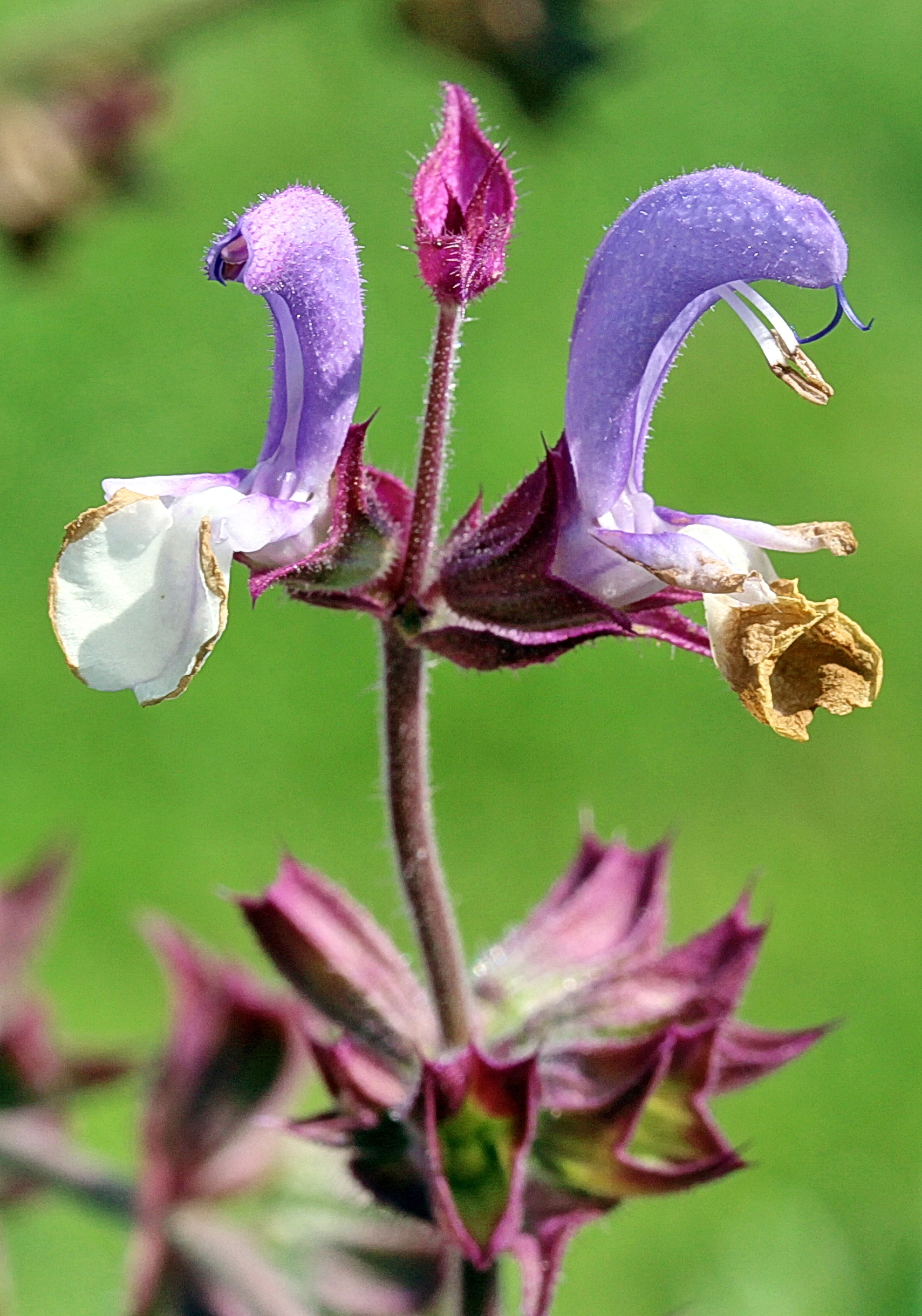 Blüten im Kräutergarten des Klosters "Zum Heiligen Kreuz" Der Muskatellersalbei ist eine Pflanze im Dr. Leuschner-Apothekergarten.